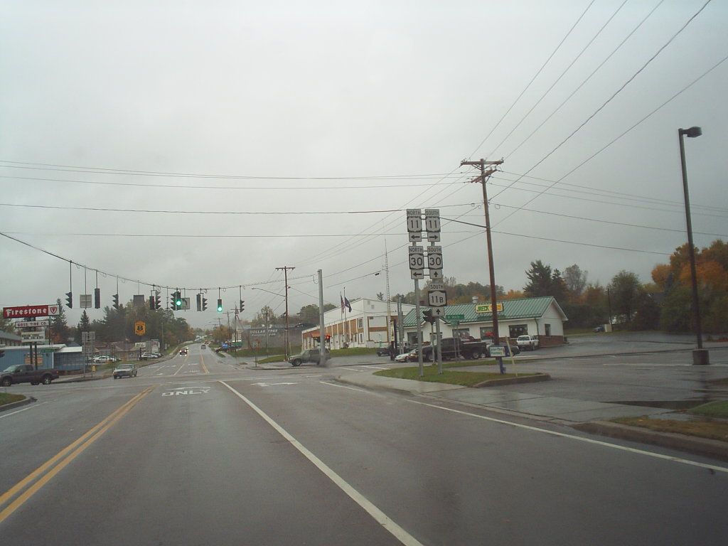 M3367S-4504